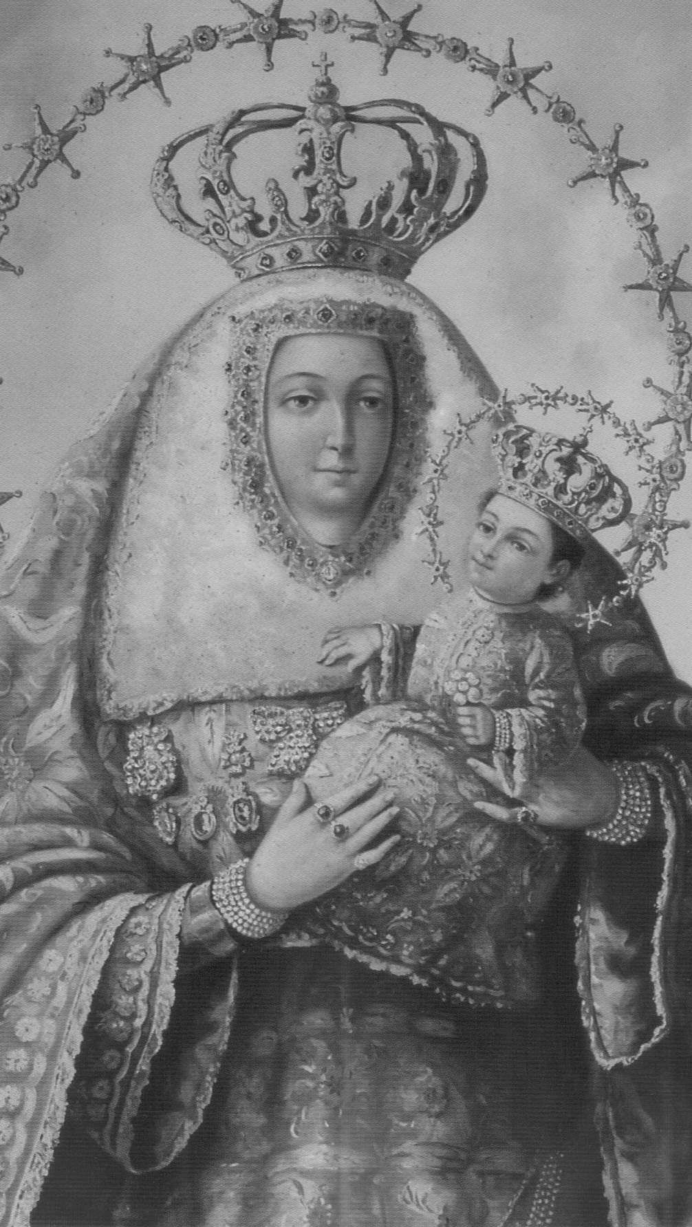 Perspectiva del cuadro de la Coronación Canónica Pontificia de la Virgen del Pino